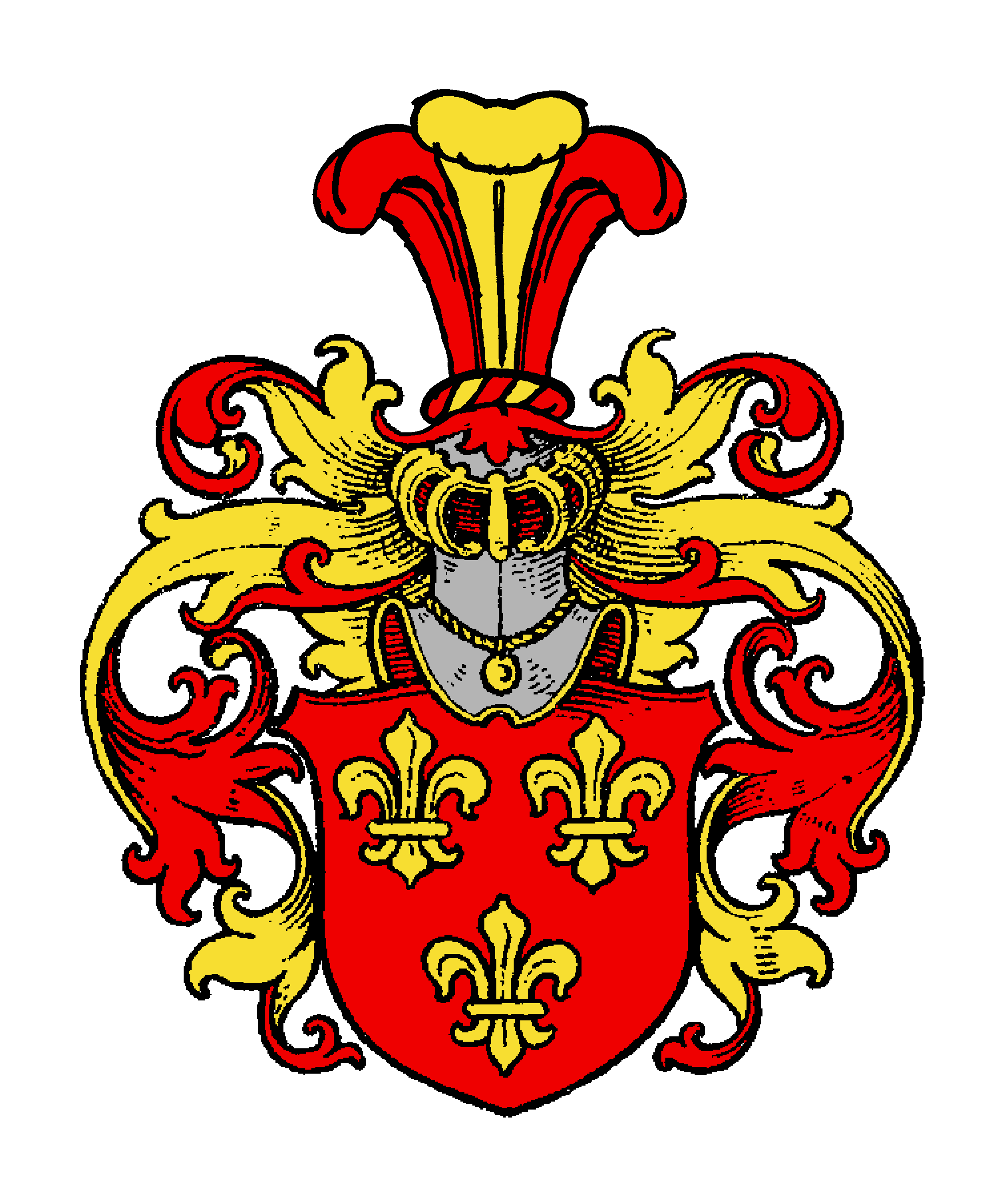 Stammwappen der von Thomstorff